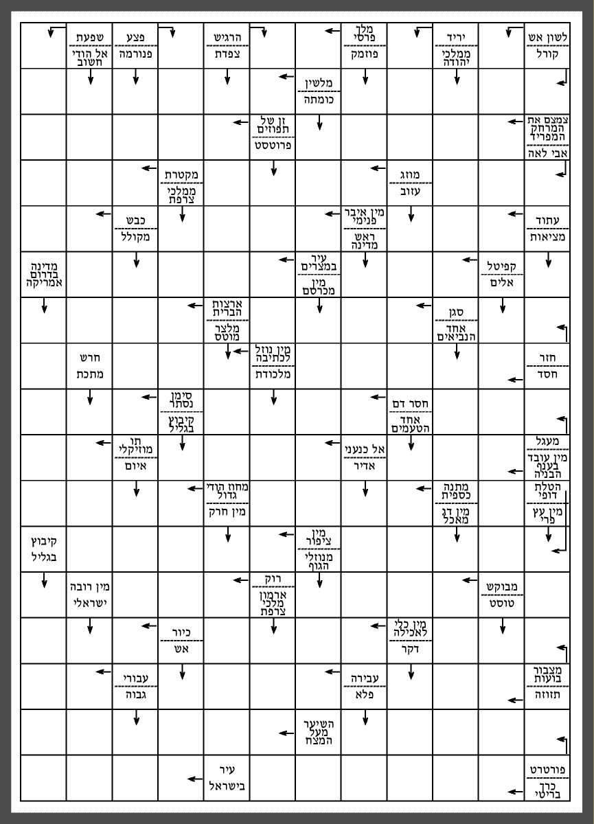 Arrow word